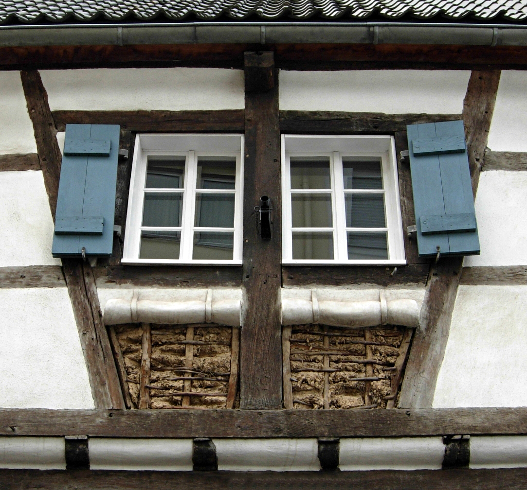 Wand eines alten Hauses in Alfter